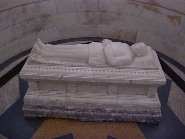 中山陵 孫文の棺 2004年5月1日撮影 撮影者：権作 公表元：